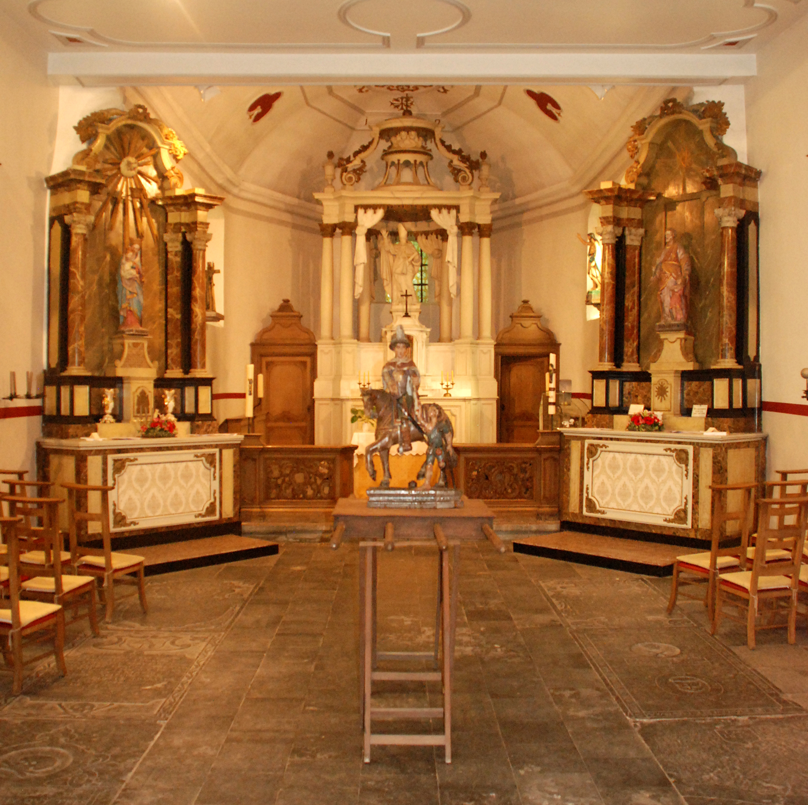 Belgique - Brabant wallon - Chapelle Saint-Martin de Lillois-Witterzée